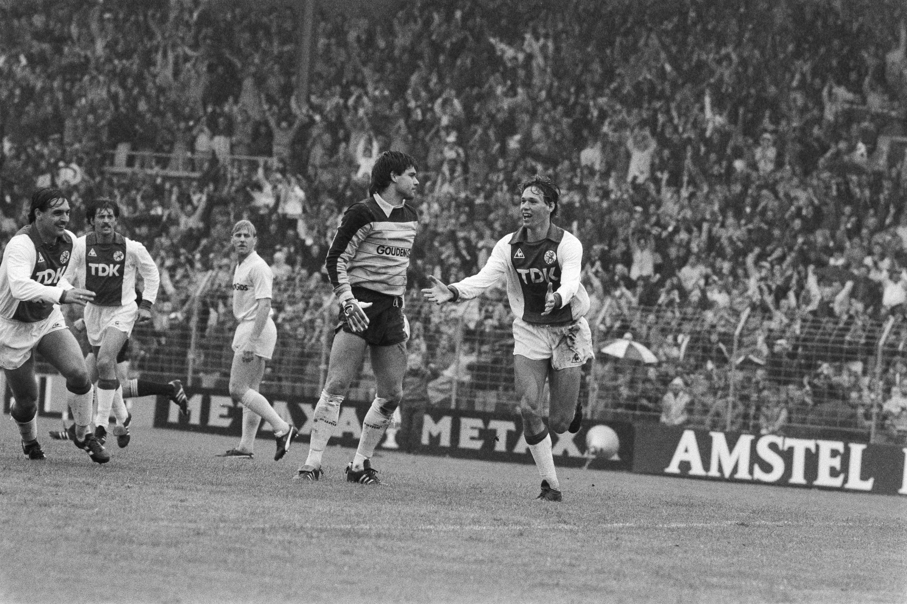 Match de football Ajax - Feyenoord à Amsterdam. Marco van Basten (à droite) se réjouit après son but (2-0), au centre le gardien de but du Feyenoord Joop Hiele est déçu.